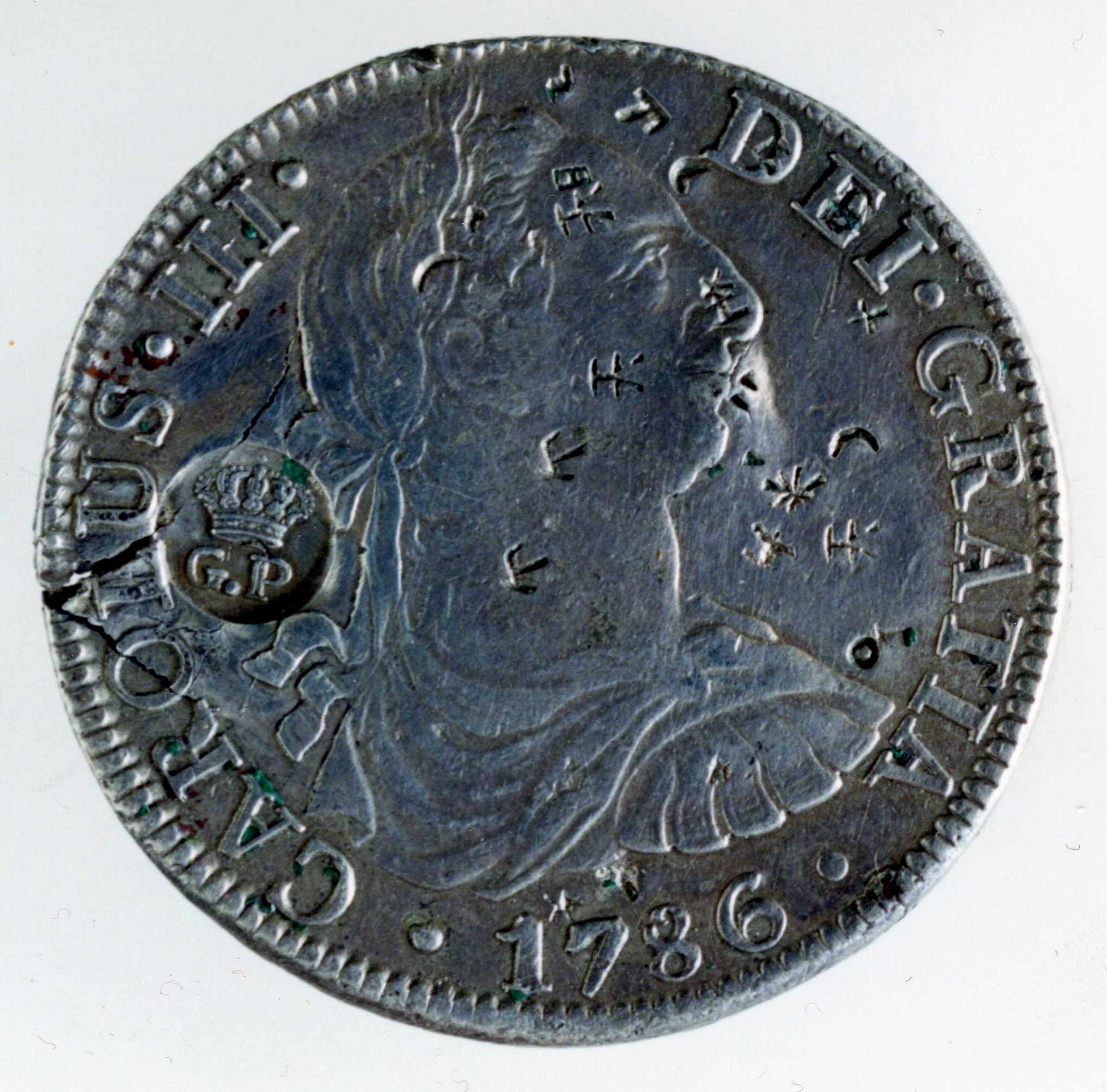 Moneda con punzón utilizado para Azores